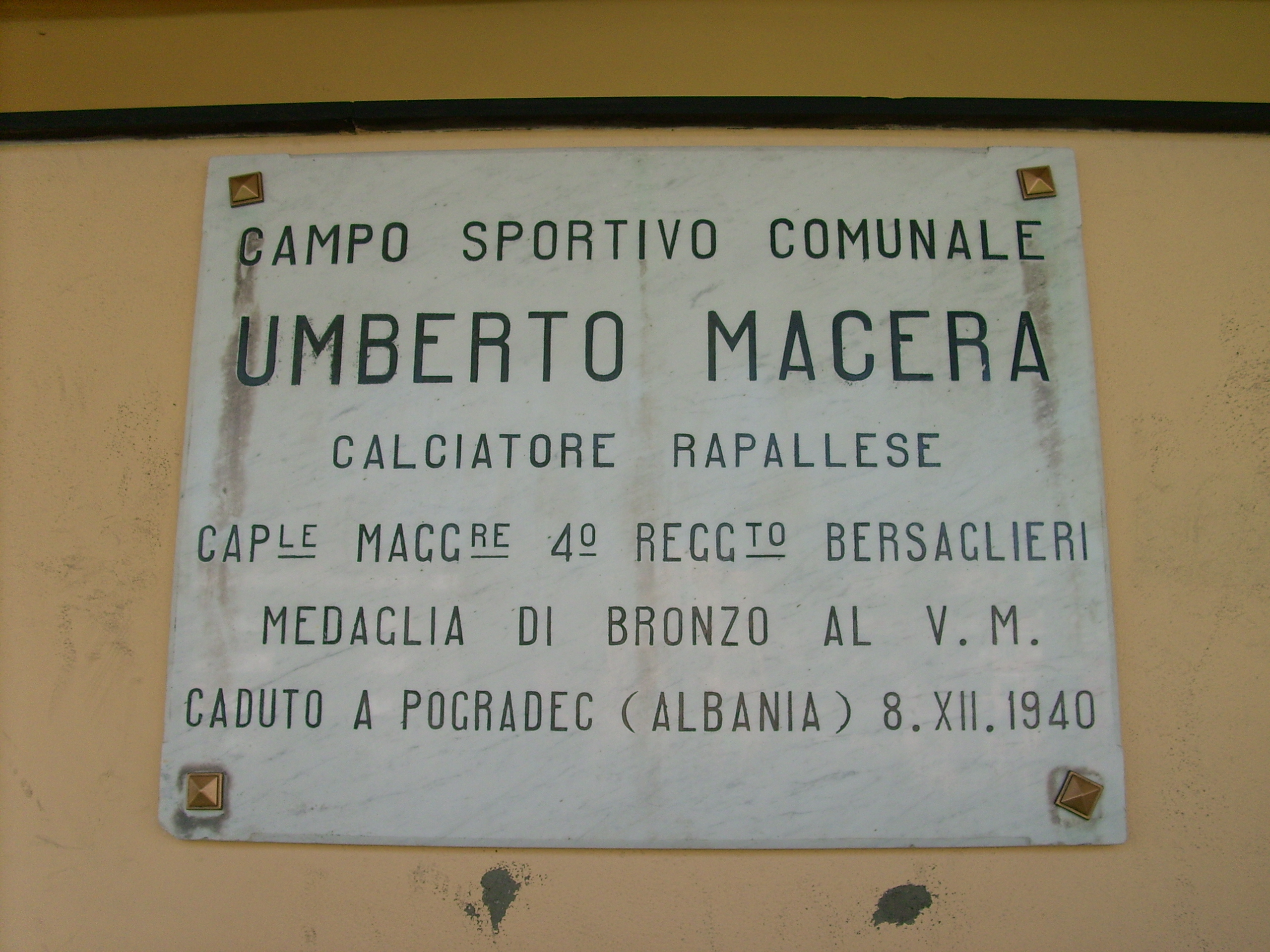 Stadio Comunale Umberto Macera - Targa Umberto Macera